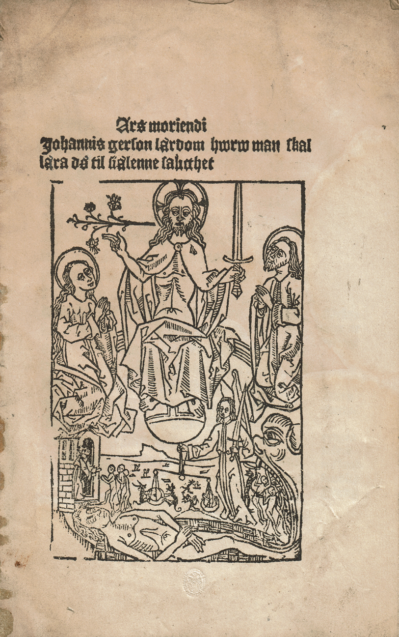 Titelblatt von Jean Gersons Ars Moriendi, Uppsala (Schweden) 1514 (Germany, Stadtgeschichtliches Museum Leipzig, Signatur Bibliothek: I K 586 )